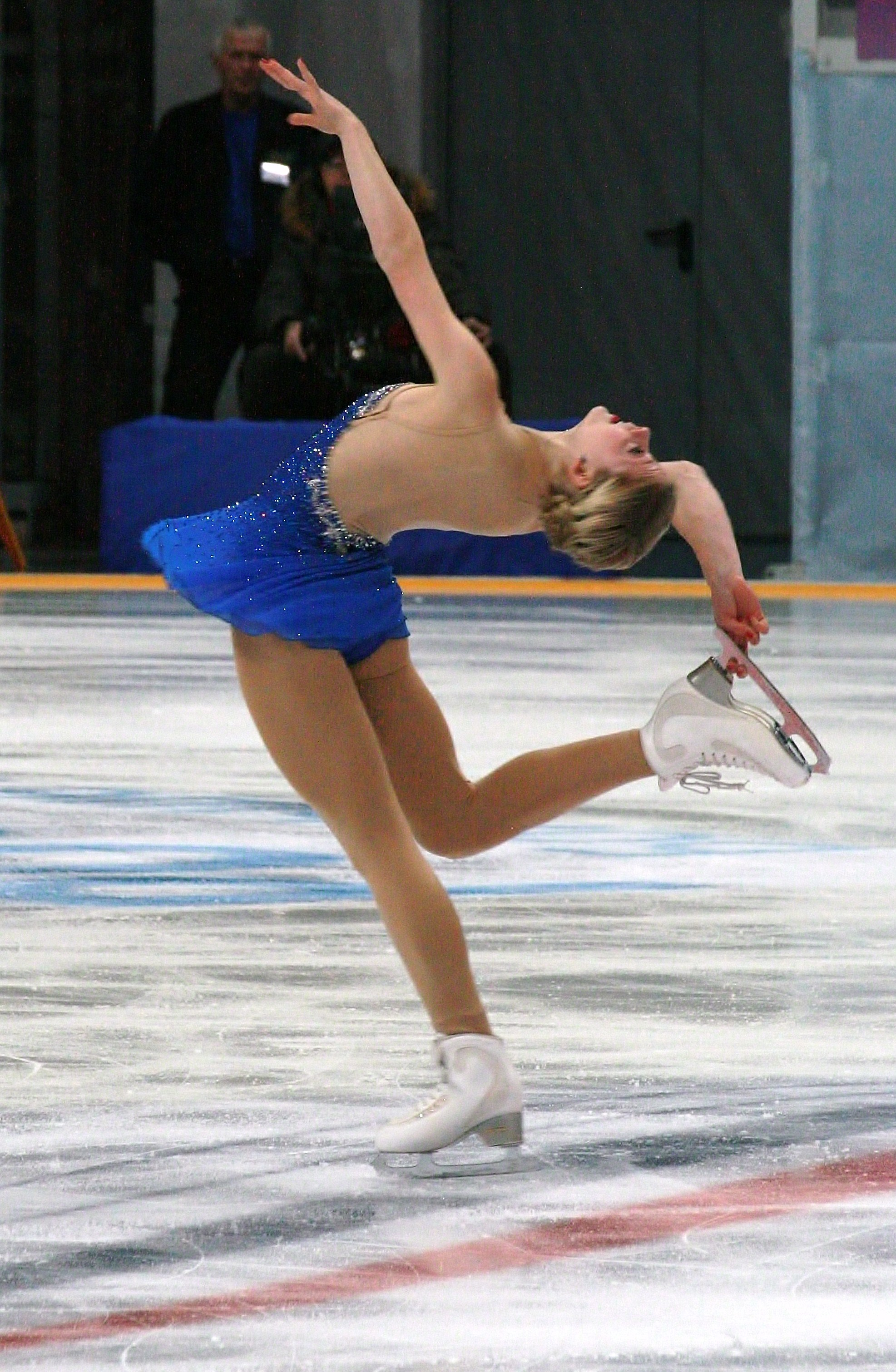 Грейси Голд (США) на Кубке Ростелекома 2012. Произвольная программа.